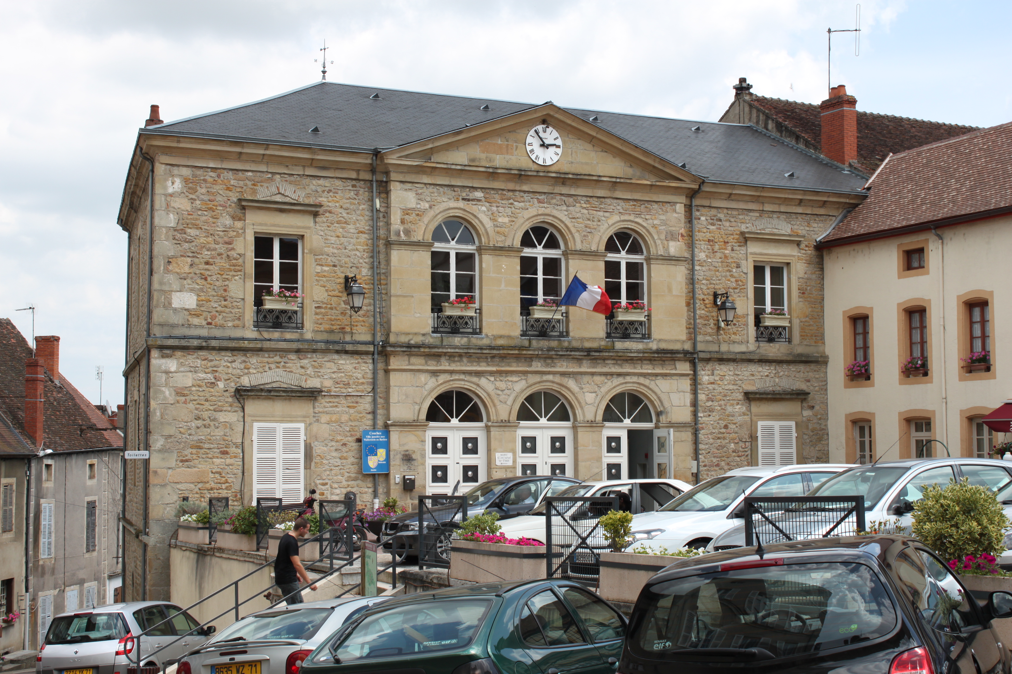 Couches, Saône-et-Loire, Bourgogne, France